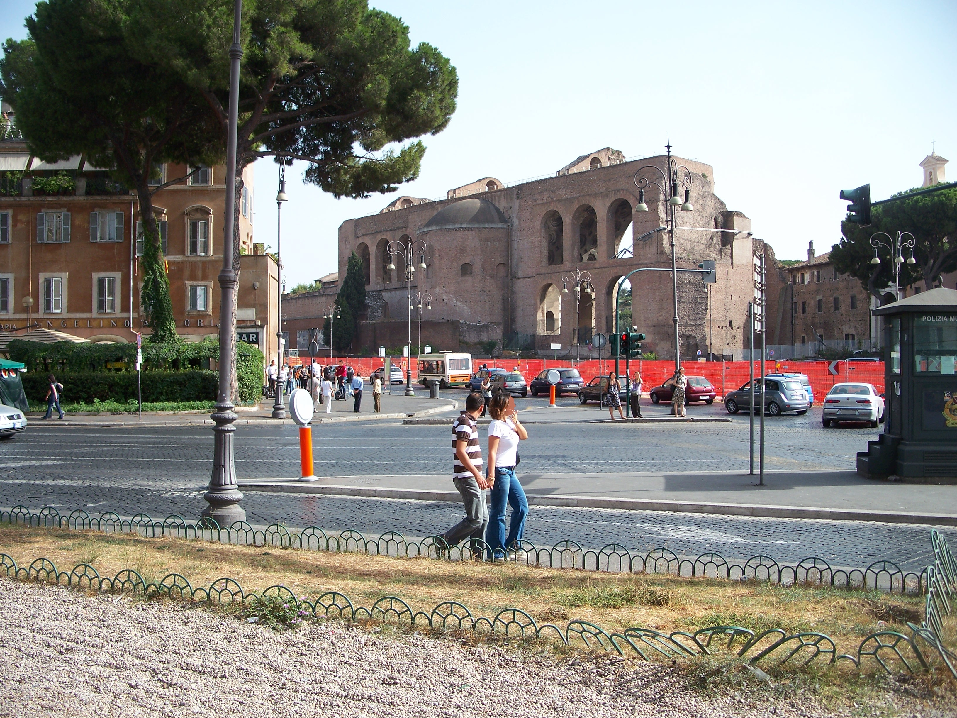 Maxentiusbasilika von der Straßenseite